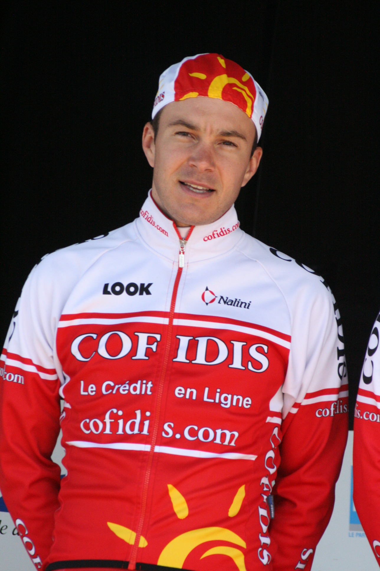 Christophe Kern, lors de la présentation des équipes des 4 jours de Dunkerque 2010